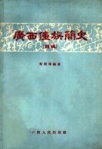 中文（香港）: 《廣西僮族簡史》（1957年6月初版嘅封面），過咗50年，進入公共領域。封面攝影嘅作者不明。